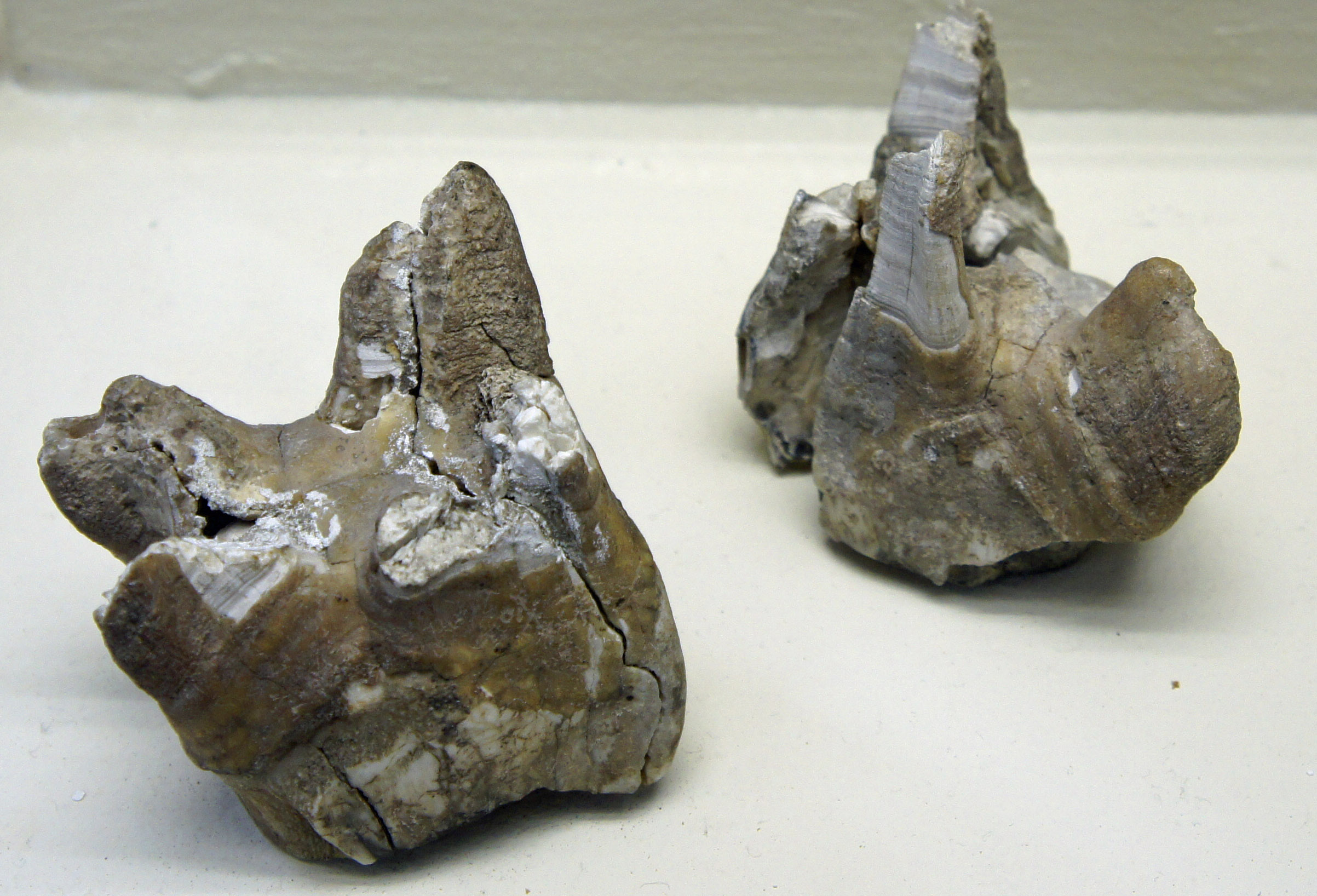 Trouvé à Champigny sur Vesle, des molaire de rhinoceros tichorhinus, actuellement en la Salle archéologie du Musée Saint-Remi .